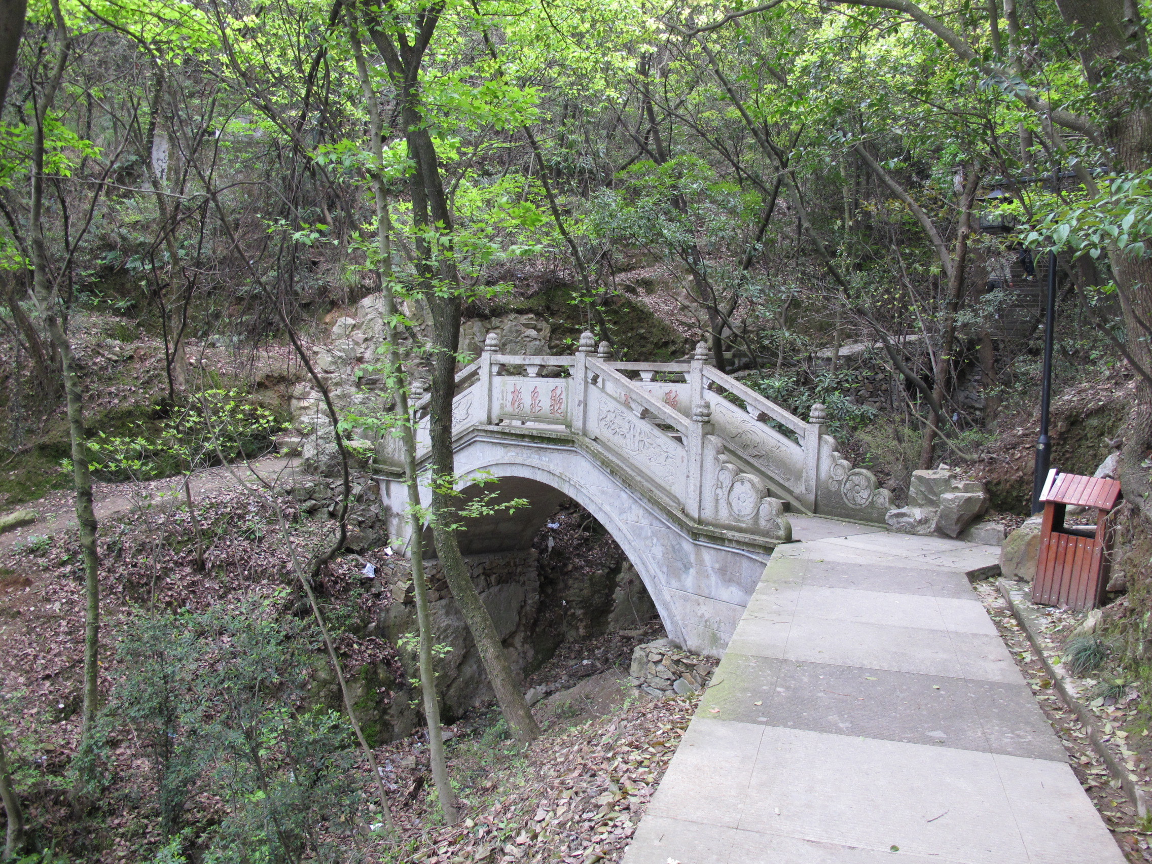 白云山听泉桥